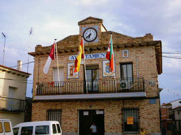 Ayuntamiento de Mesegar de Tajo (Toledo)